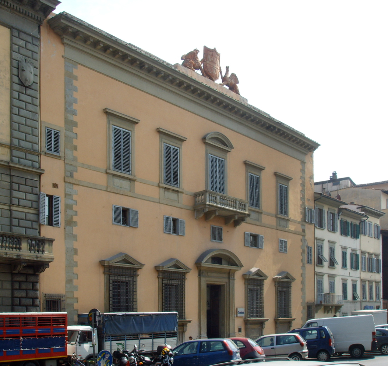 Palazzo_di_neri_corsini